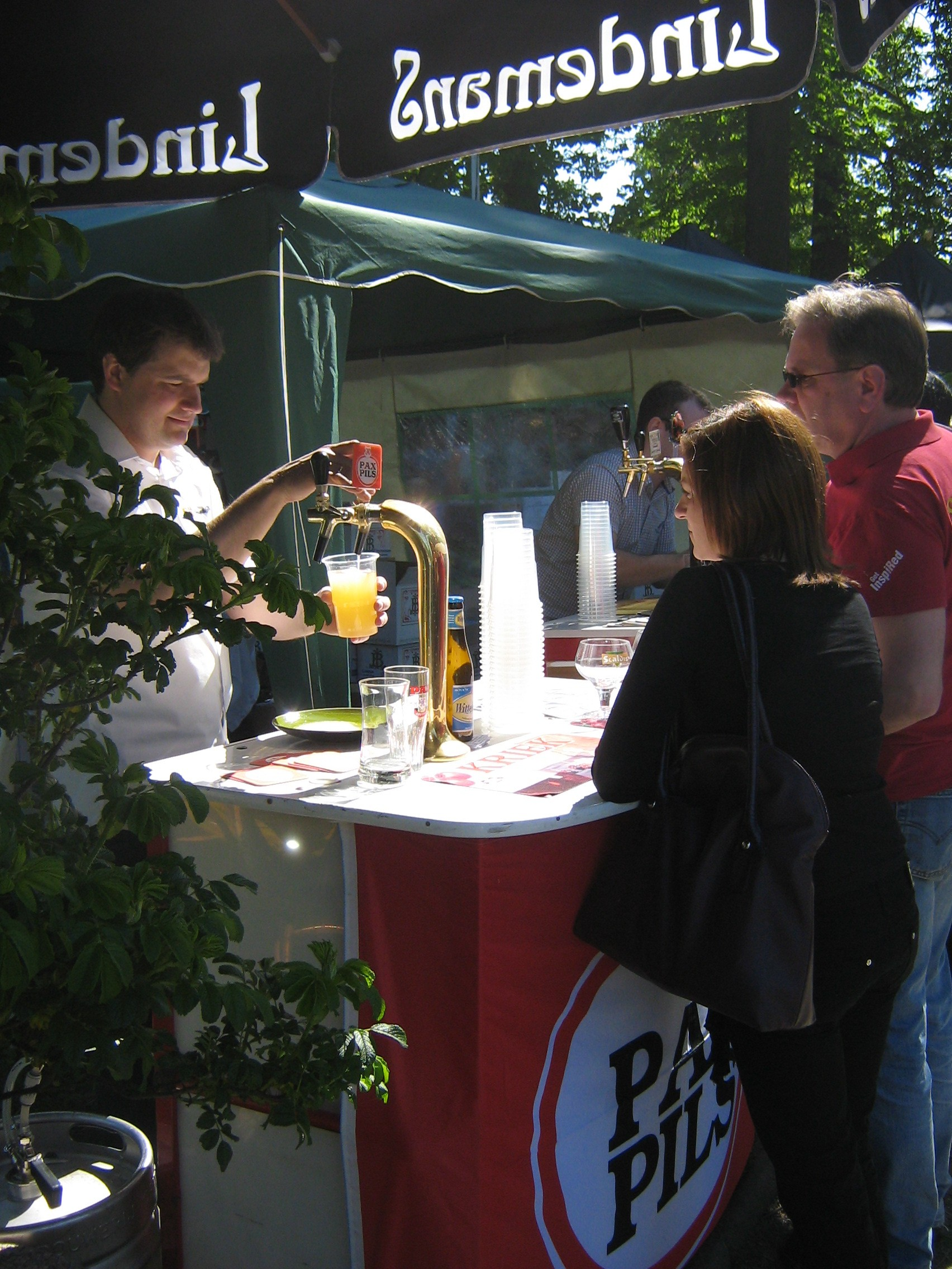 Stoisko browaru Lindemans z Belgii na Festiwalu Dobrego Piwa we Wrocławiu, 2011 r.